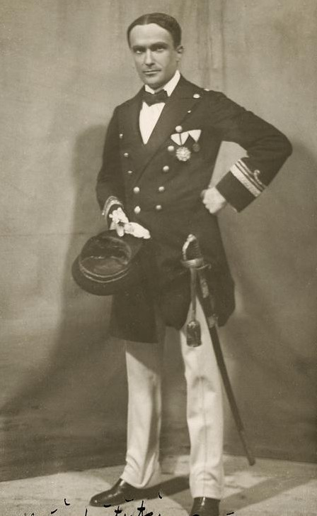 Jiří Steimar ve hře J.Hilberta Jejich štěstí, role - Vladimír Lanský (1916)